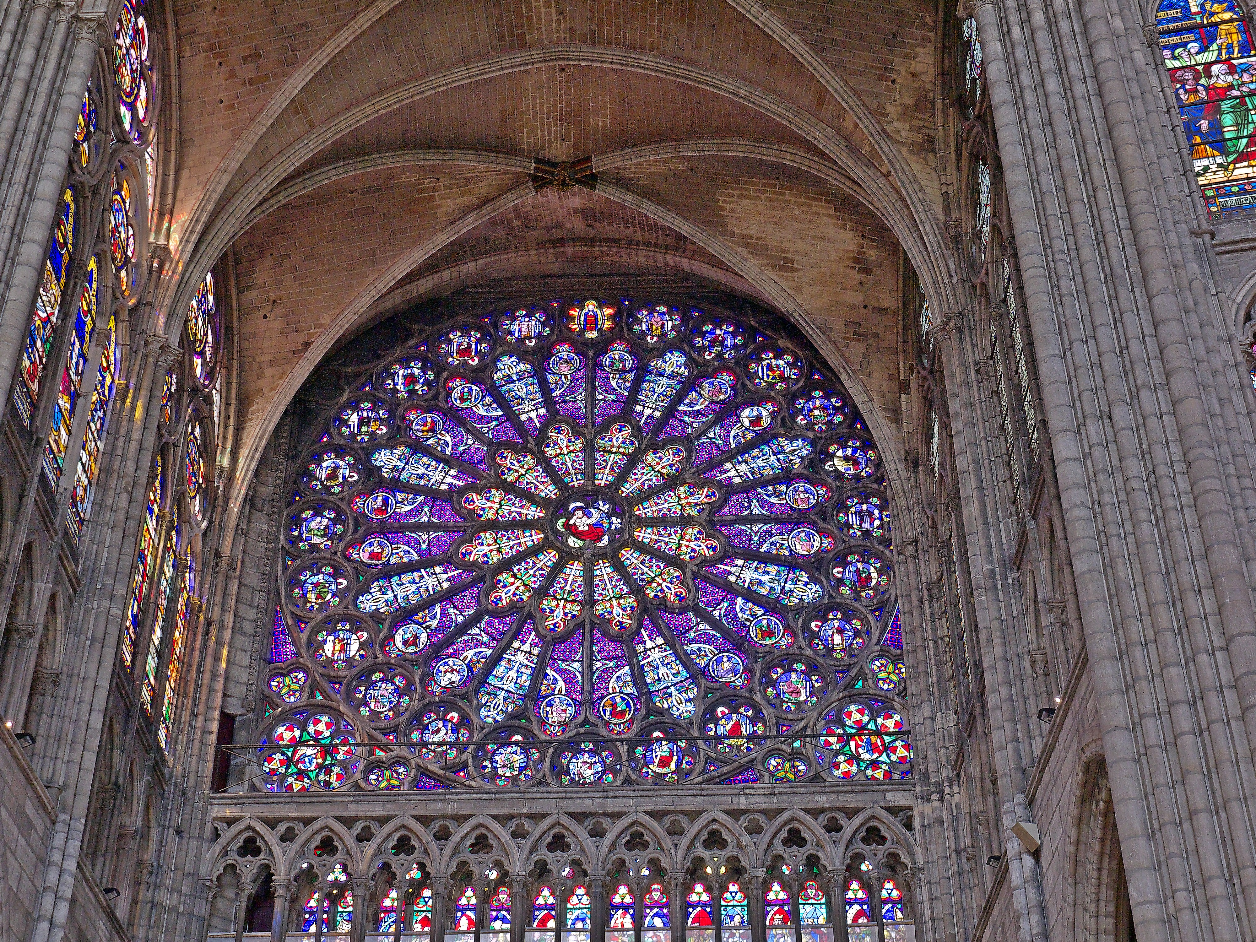 Détail de la rosace du transept, dans la basilique Saint-Denis (France). .